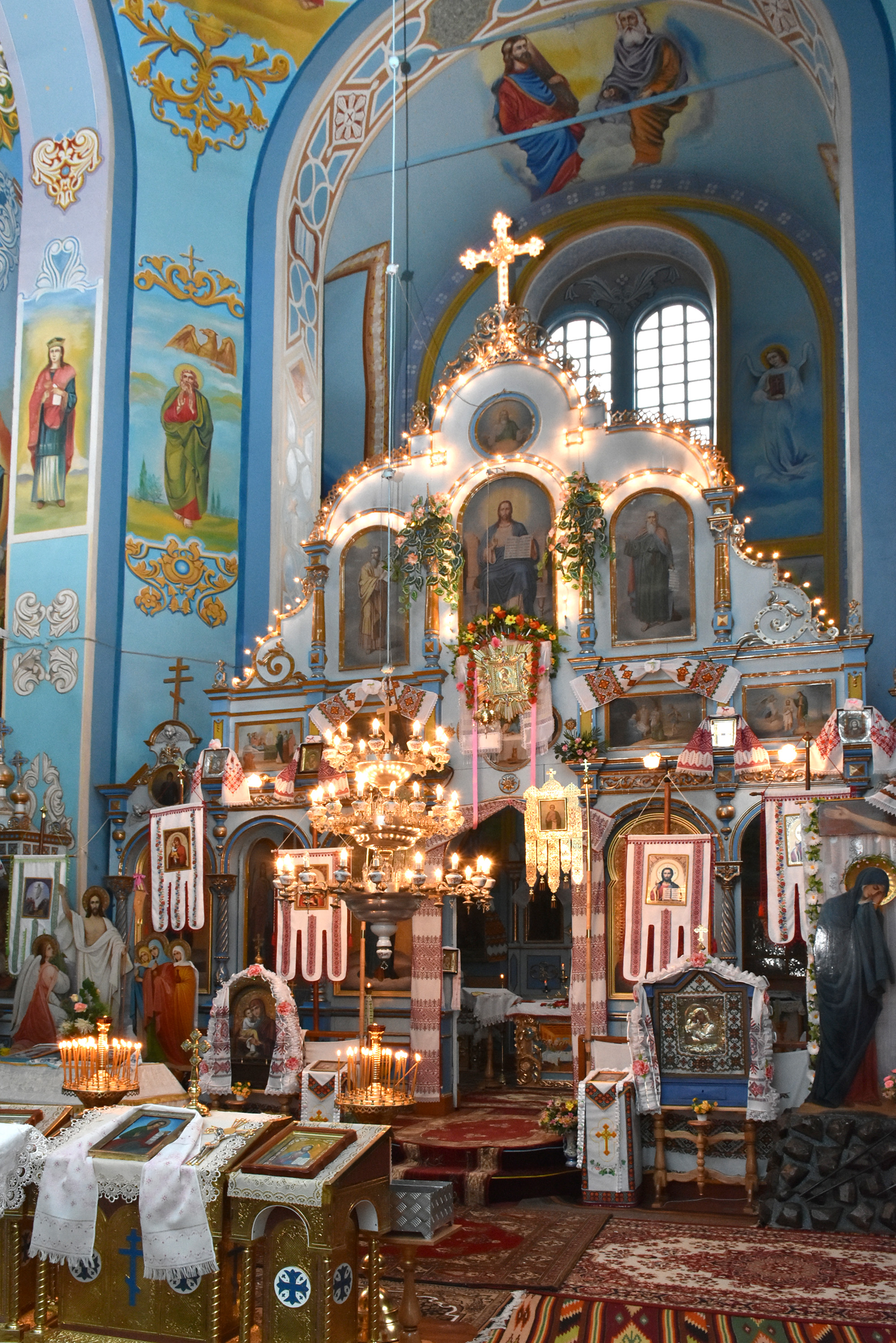 Іконостас церкви Воскресіння Христового в селі Лопушне Лановецького району Тернопільської області (Україна); 1850 рік.